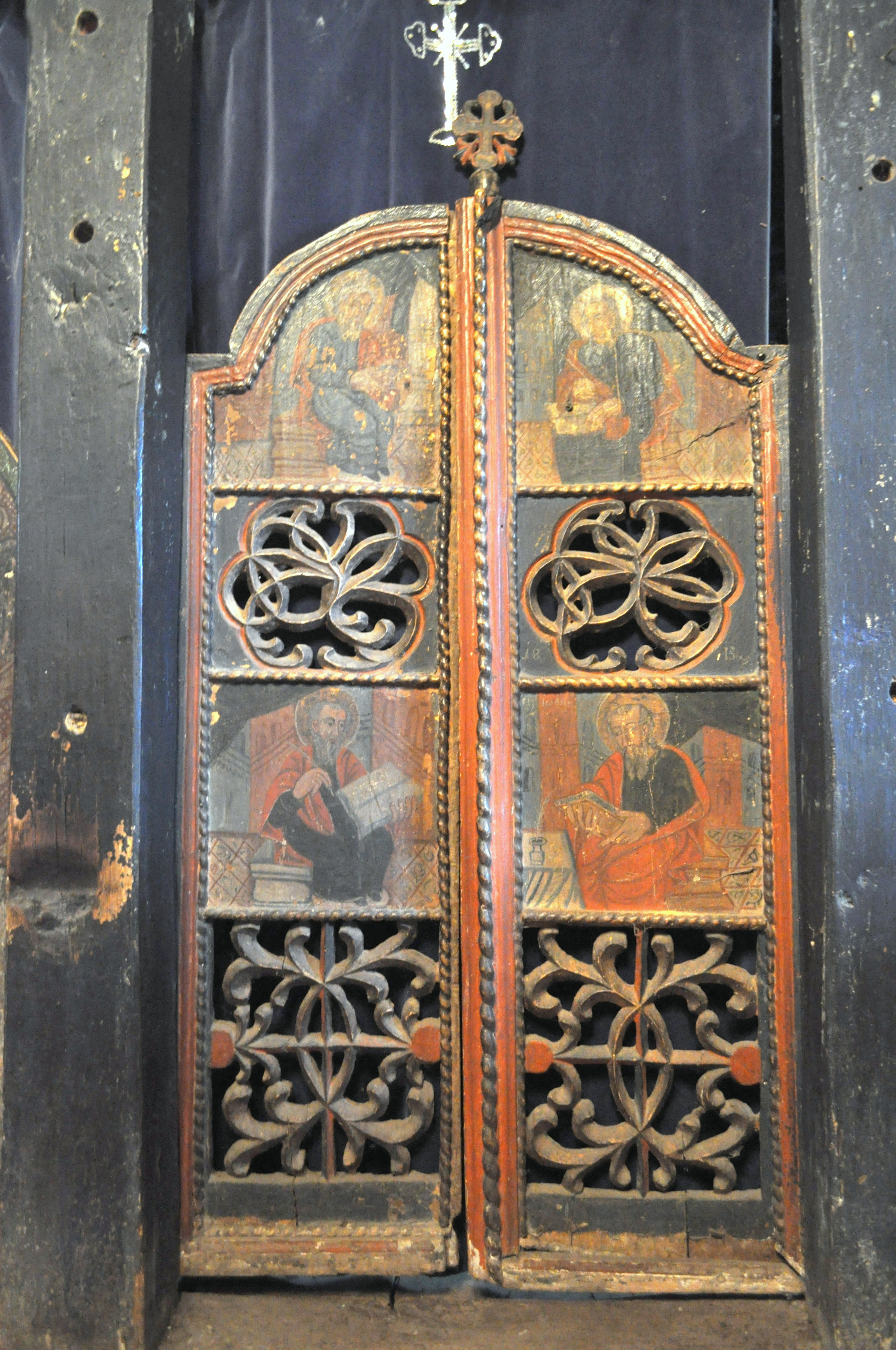 Biserica de lemn din Răstolțu Deșert, comuna Agrij, județul Sălaj